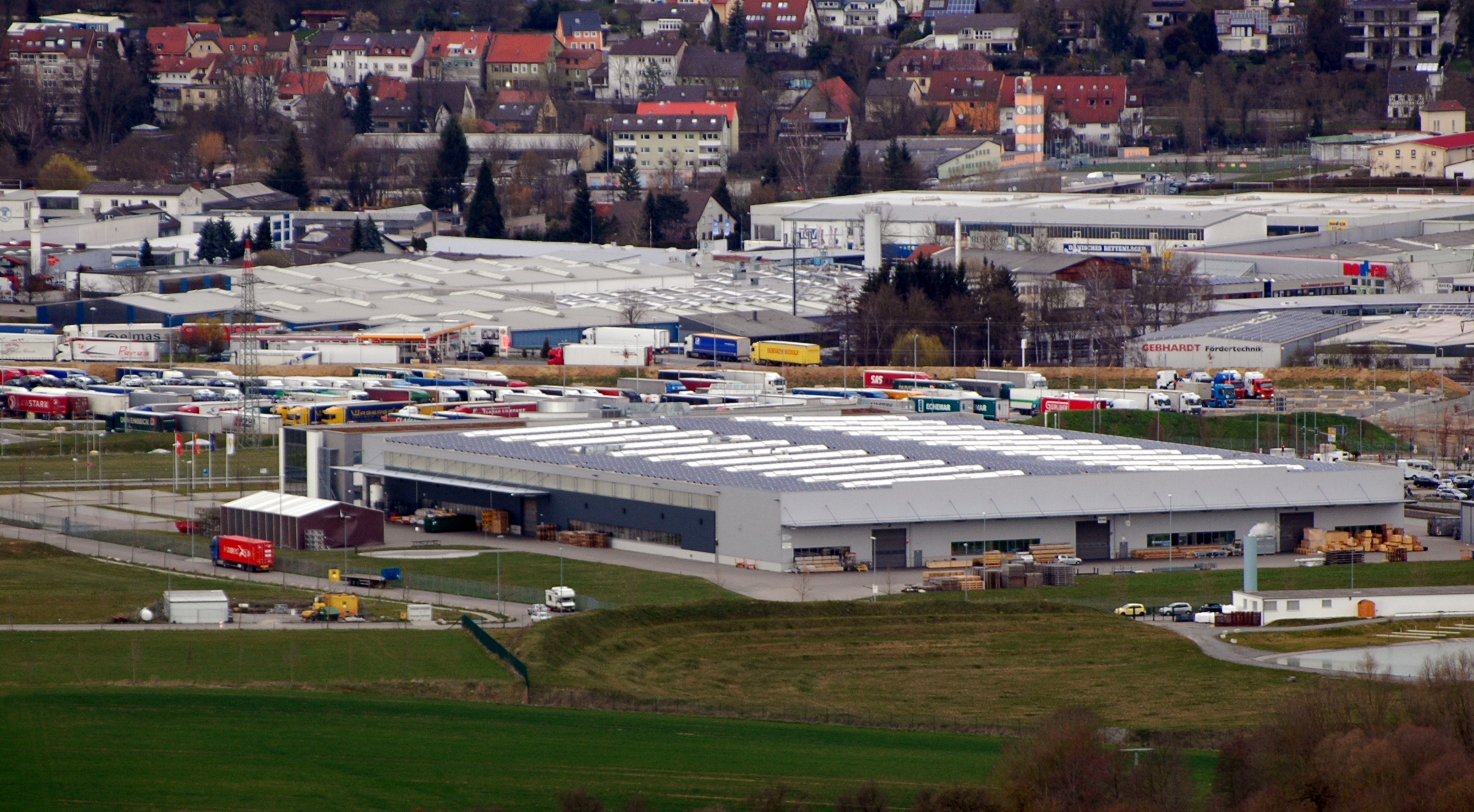 Firme Interroll Automation in SinsheimThis photograph was taken with a Nikon D70